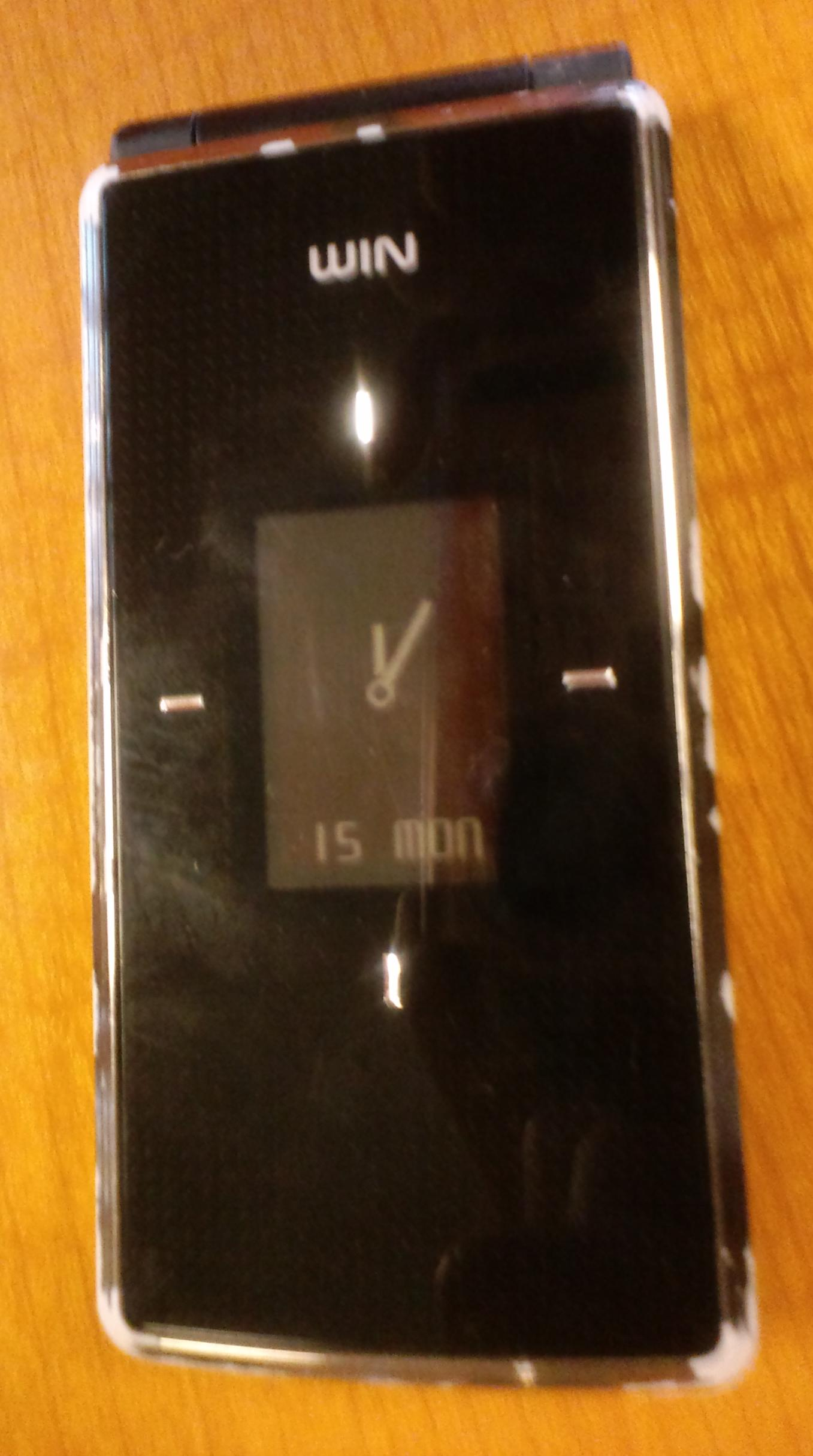 au SHARP URBANO